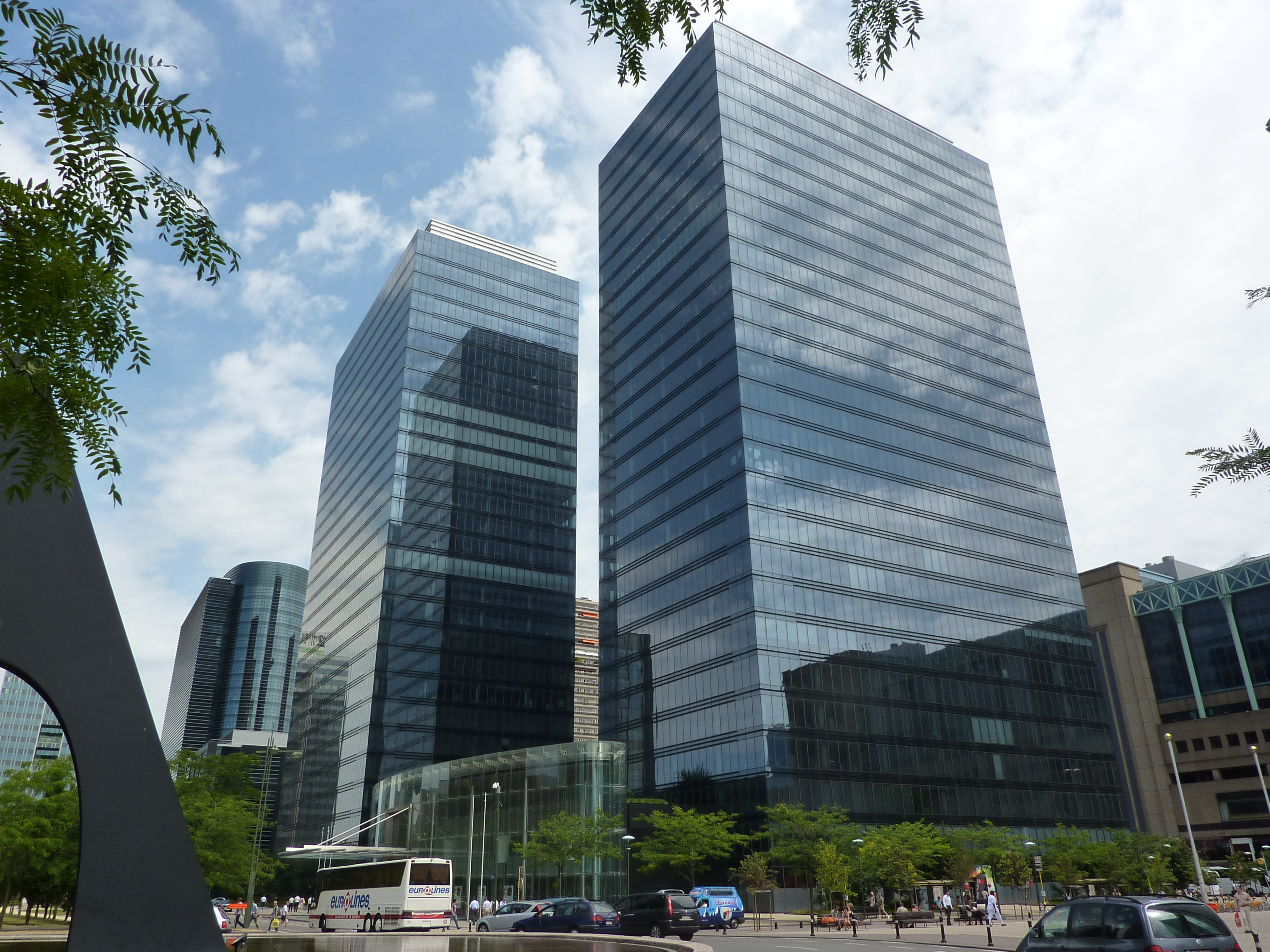 Les North Galaxy Towers à Schaerbeek, Bruxelles, Belgique.